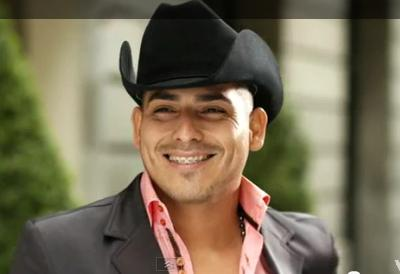 Espinoza Paz